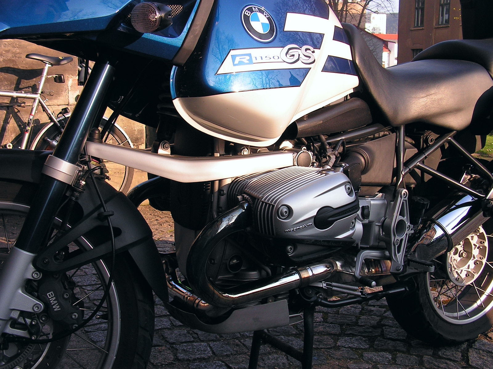 BMW R 1150 GS 2-Zylinder-Viertakt-Boxermotor Vier-Ventiler Foto Wolfgang Pehlemann Wiesbaden PICT0037